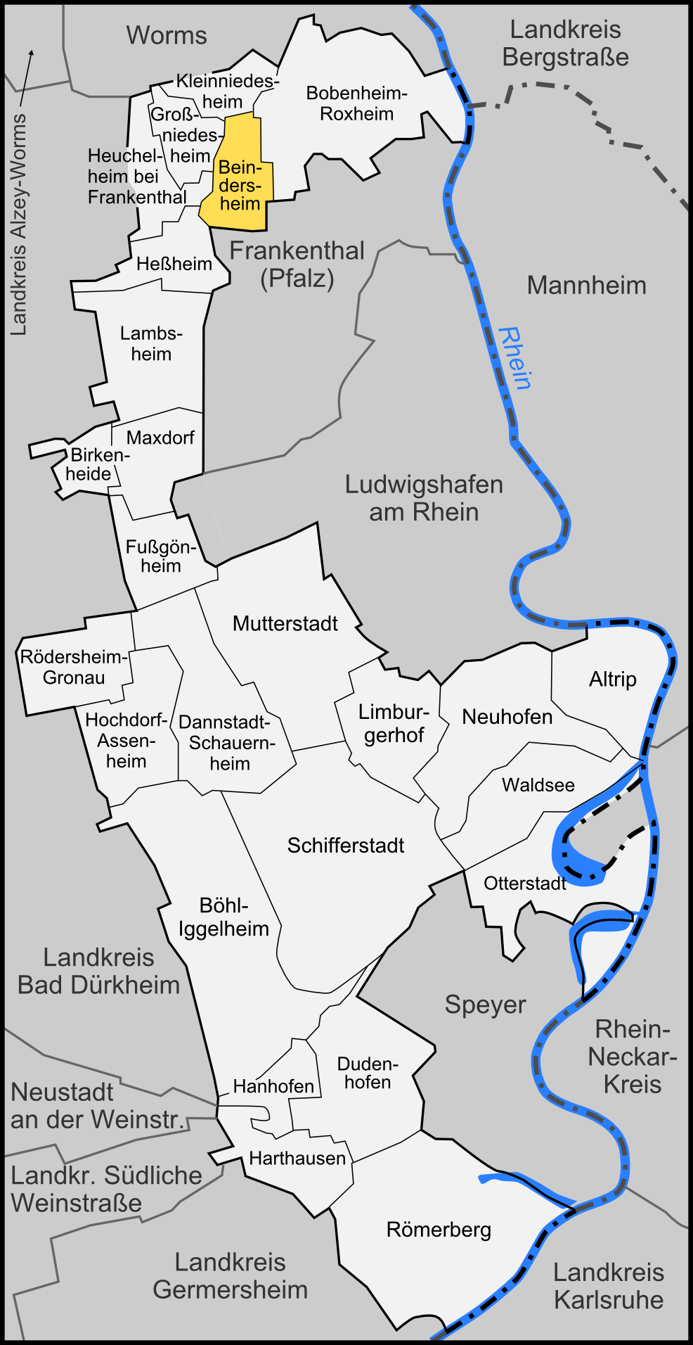 Karte der Gemeinde Beindersheim im Rhein-Pfalz-Kreis